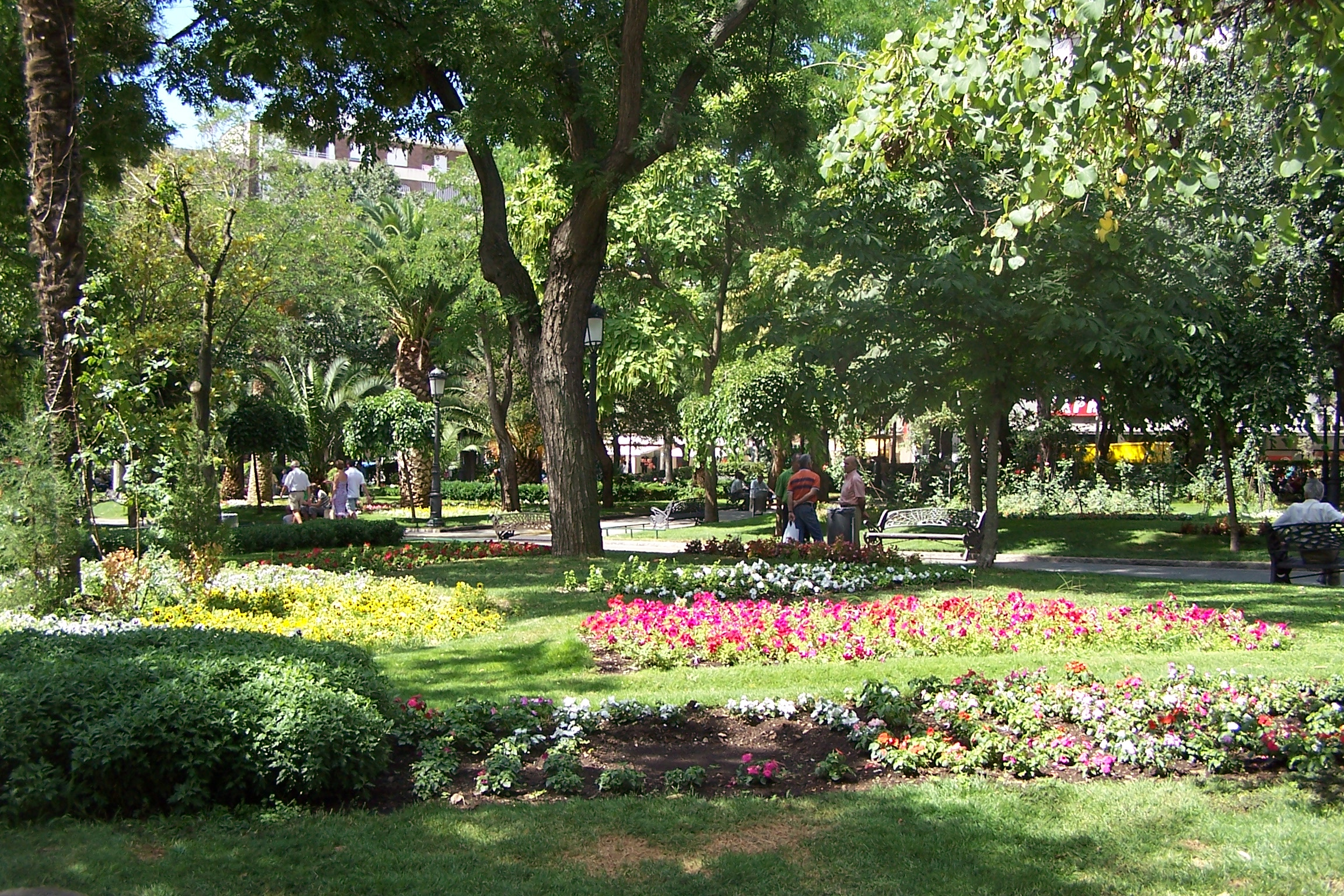 Paseo de San Gregorio